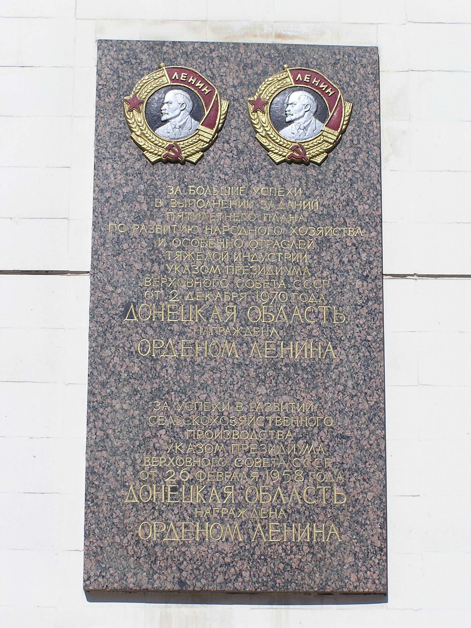 мемориальная табличка в Донецке